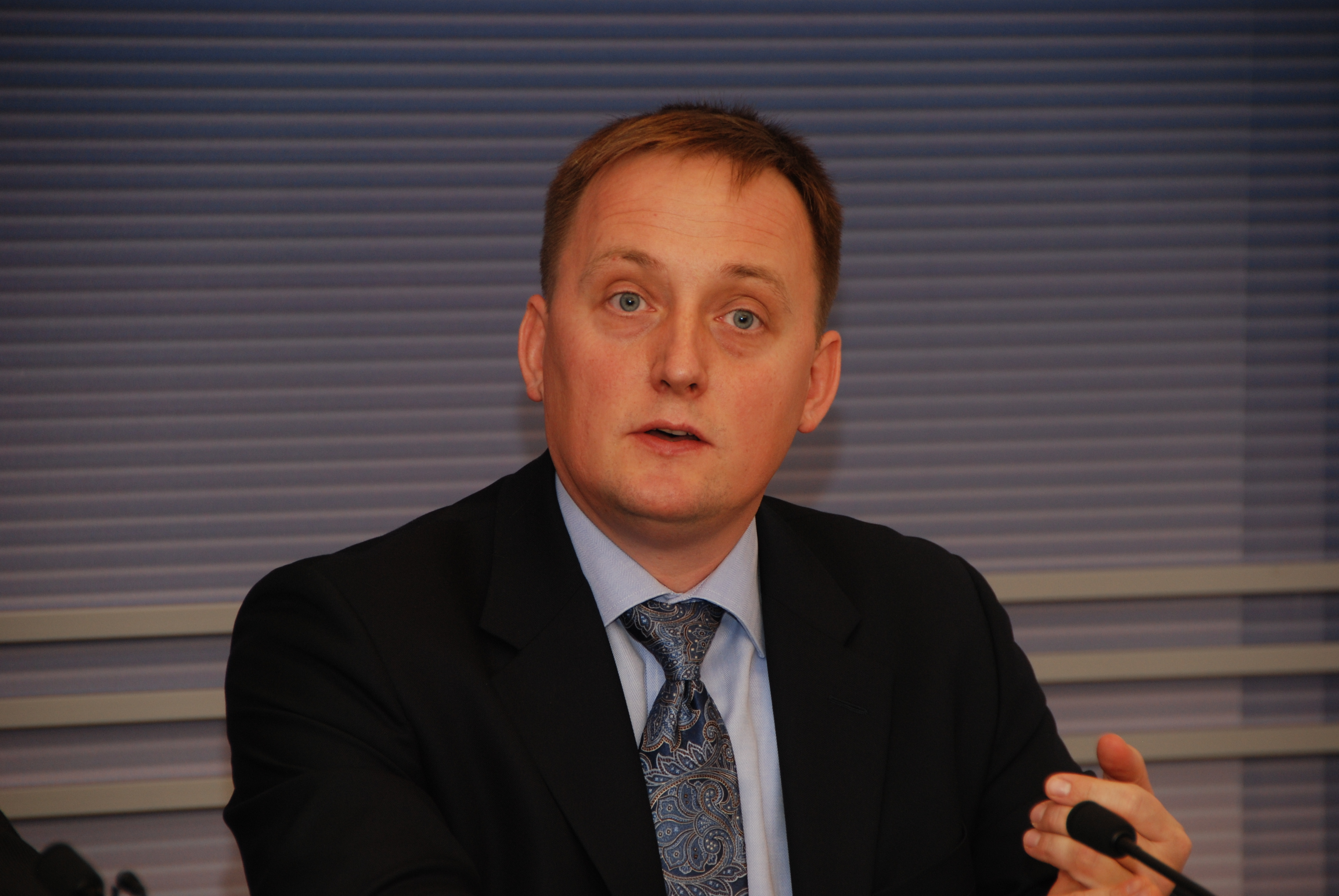 Swedbank galvenais ekonomists Mārtiņš Kazāks informē par gada pārskatu "Latvijas valstij piederošie aktīvi 2009" Foto: Aivis Freidenfelds, Valsts kanceleja